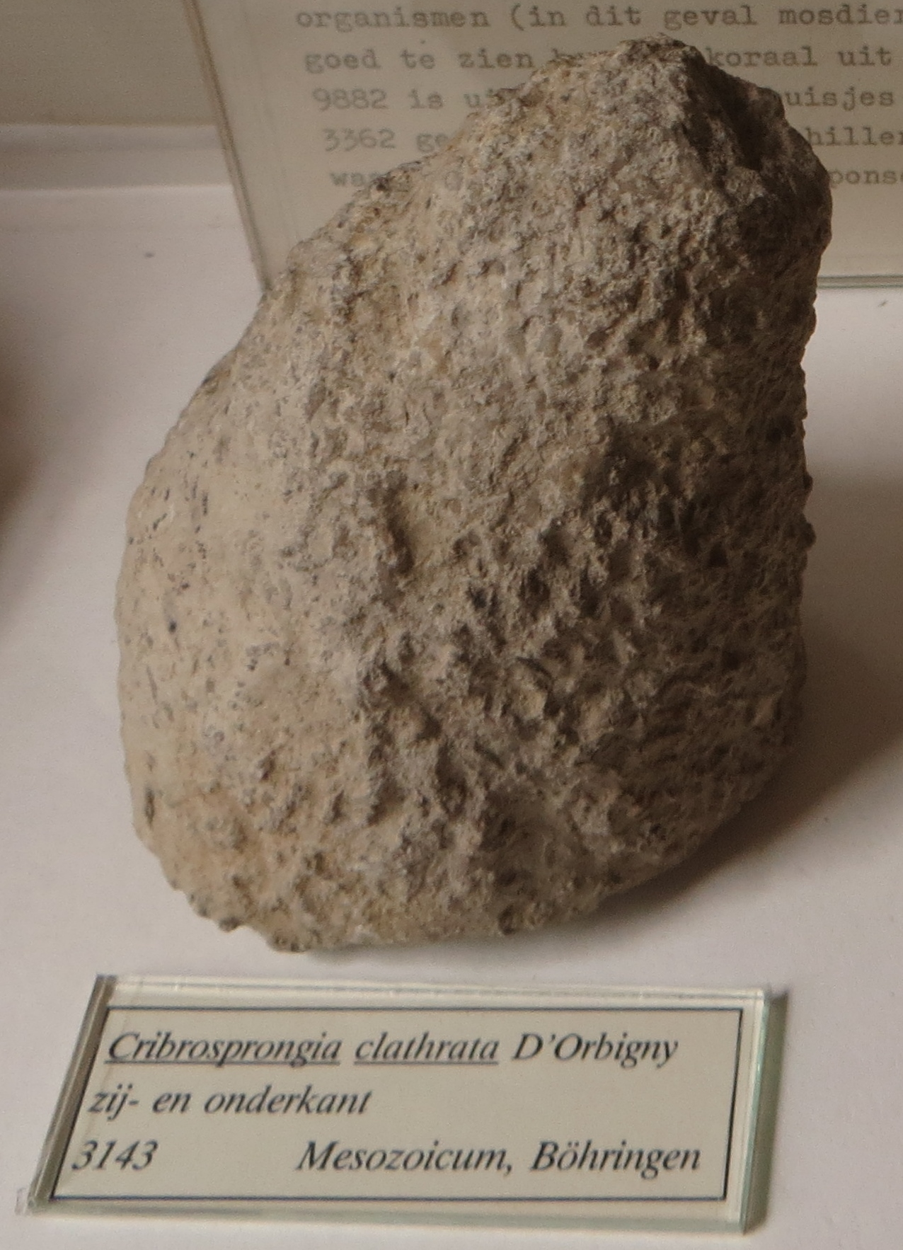 Fossil- Took the picture at Teylers Museum, Haarlem